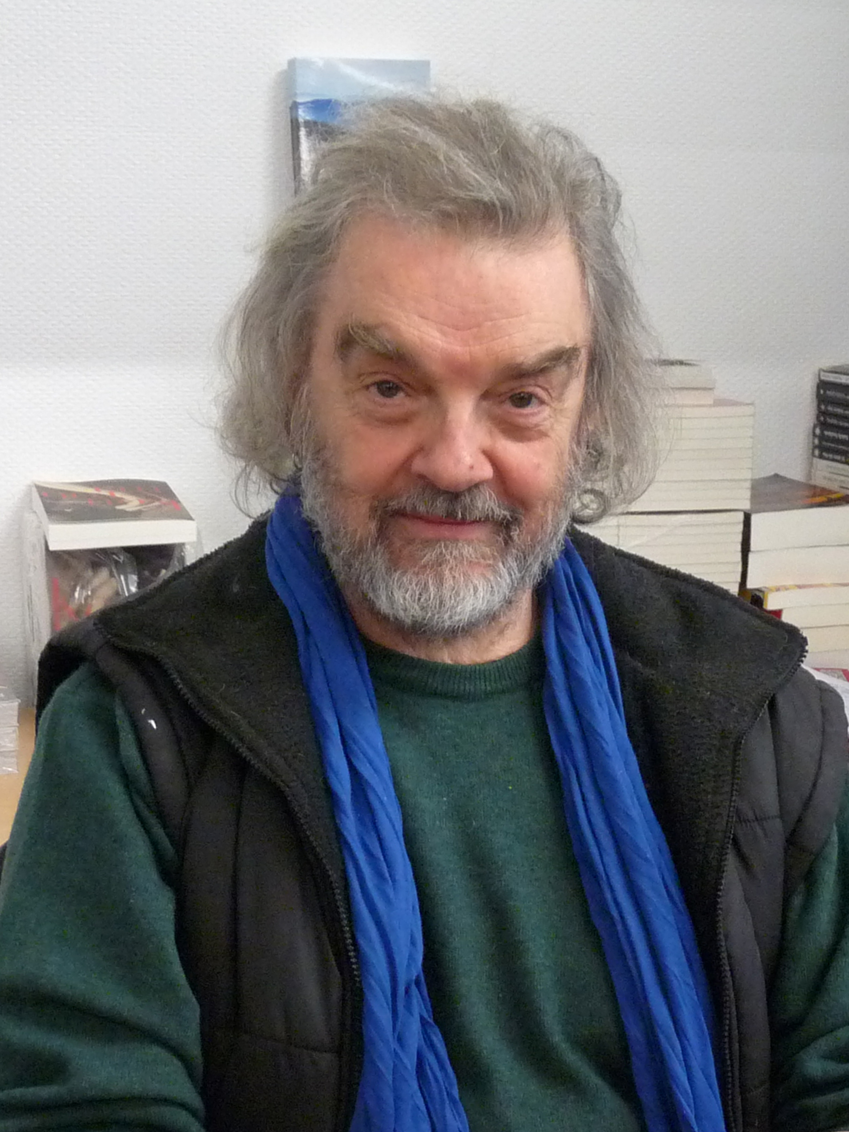 Pierre Pelot au Salon du Livre Amerigo Vespucci du Festival international de géographie de Saint-Dié-des-Vosges.